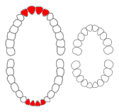 Snijtanden aangegeven met rood.